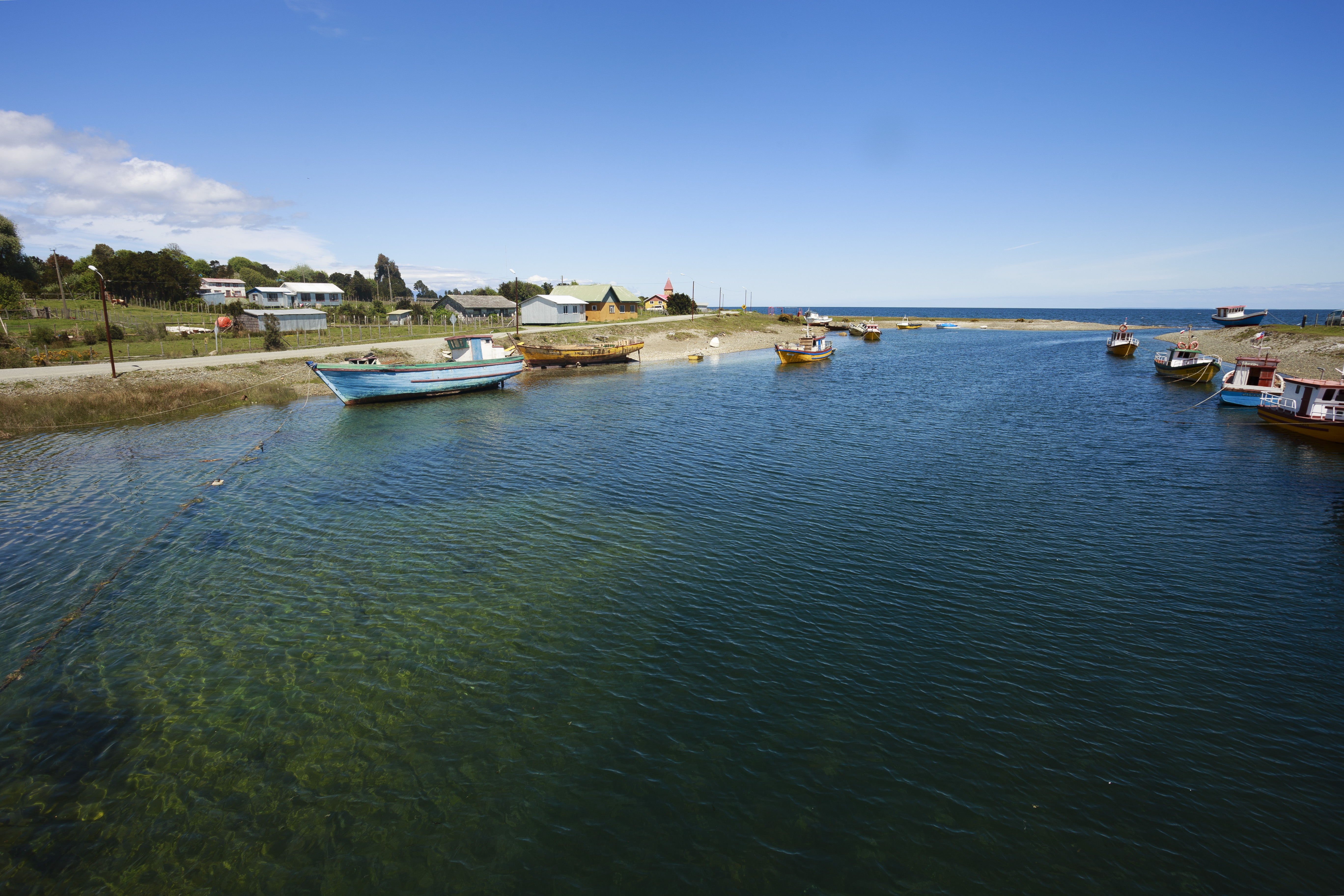 Localidad de Chauchil, comuna de Hualaihué, Chile.